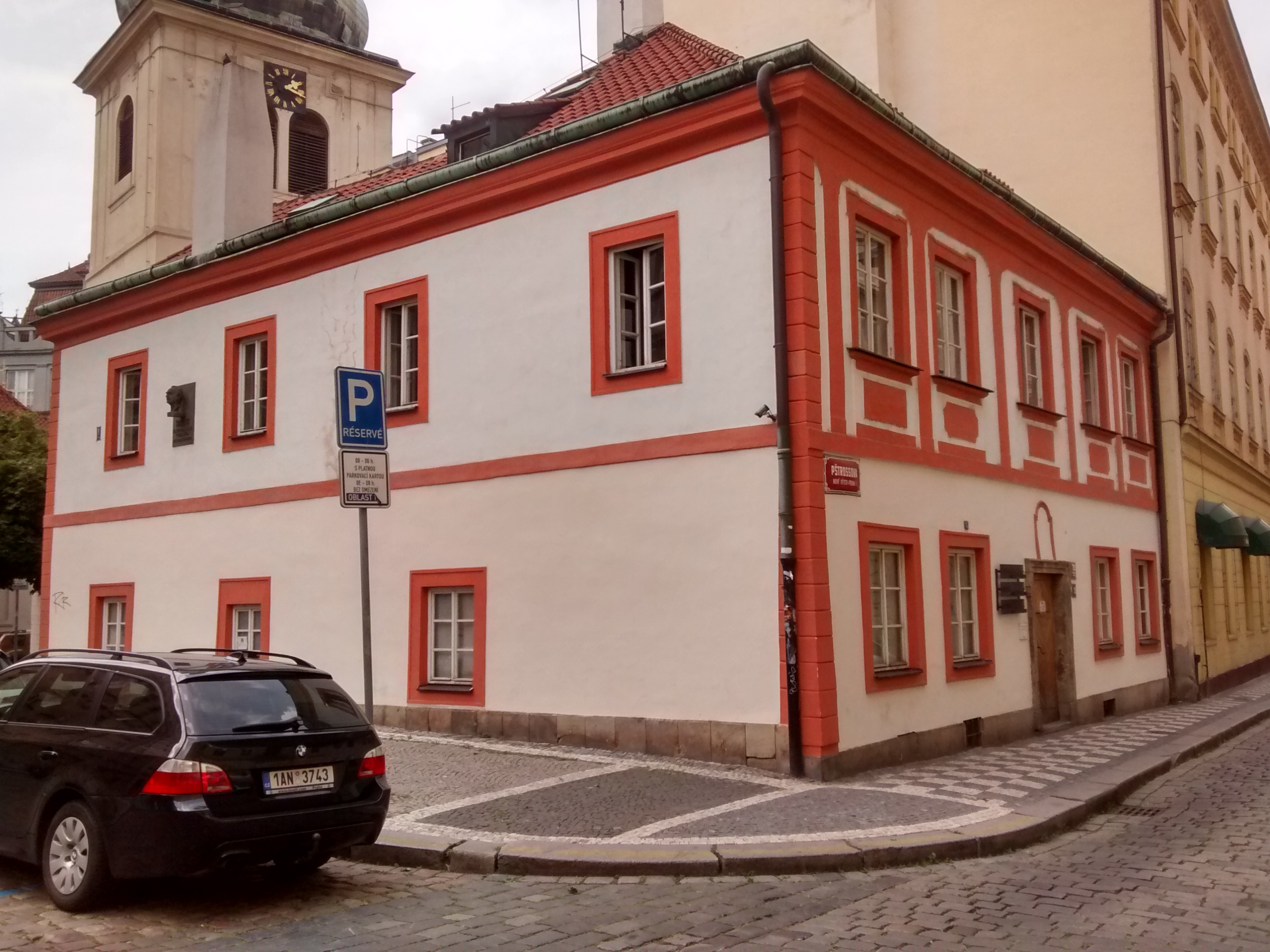 Prague Film School, Pštrossova 201/19, Nové Město.